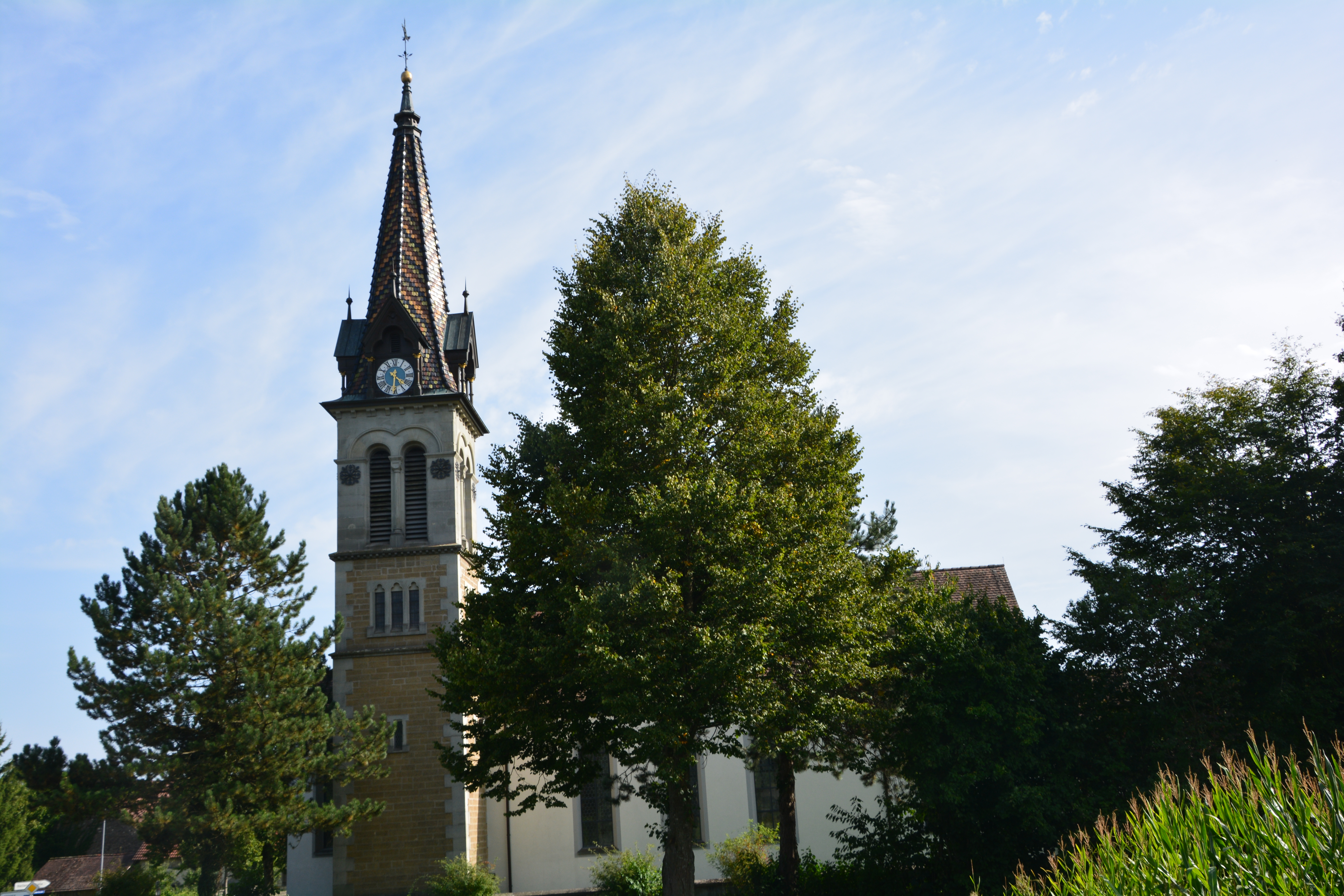 Stockach, Kirche St. Michael